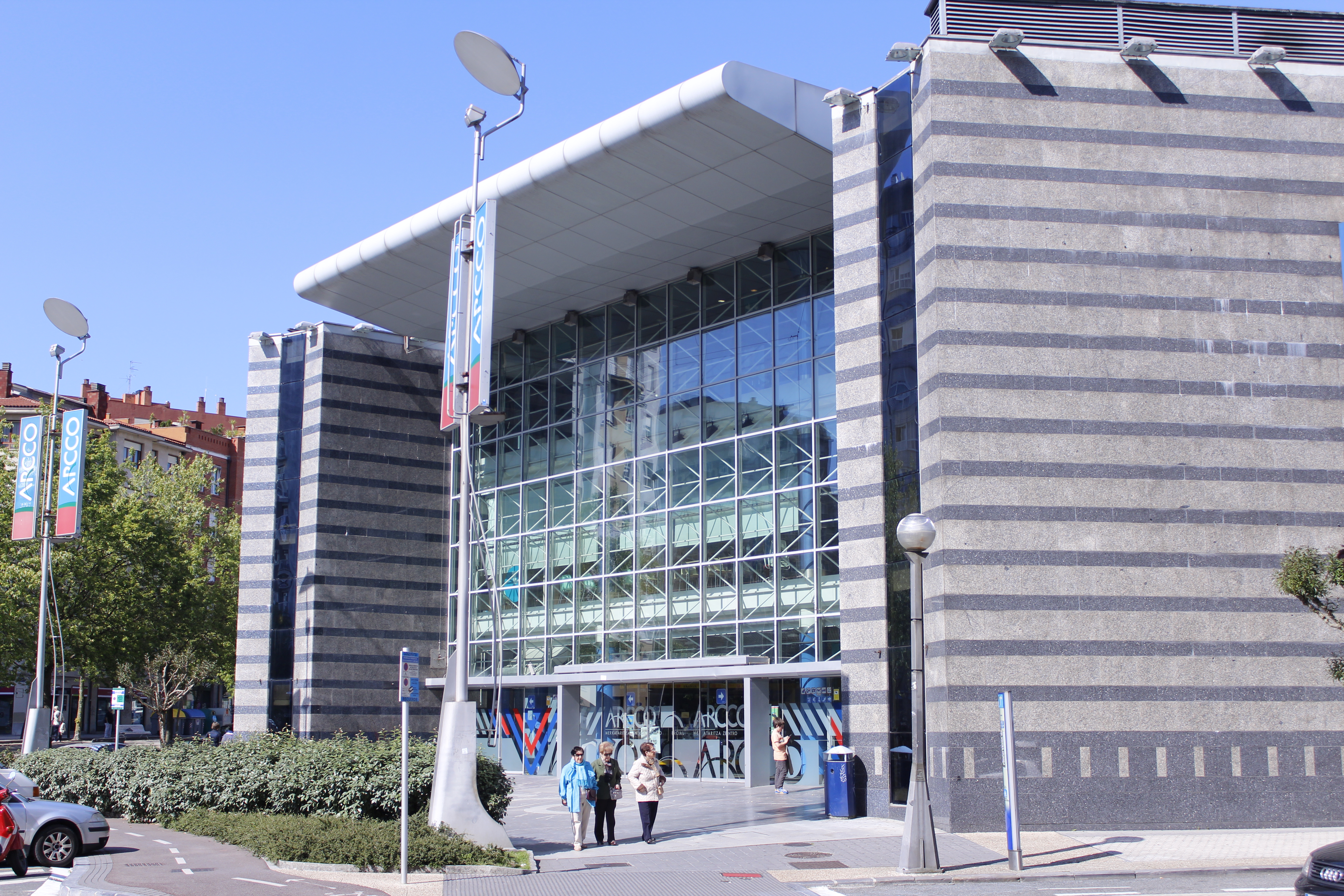 Arcco Amara saltokiaren eraikina, Donostian, Amara auzoan